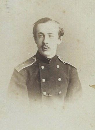 Князь Константи́н Эсперович Белосе́льский-Белозе́рский (1843—1920) Чин/звание: «Генерал-лейтенант» Знаки различия на картине: погоны и звёзды «Прапорщик»